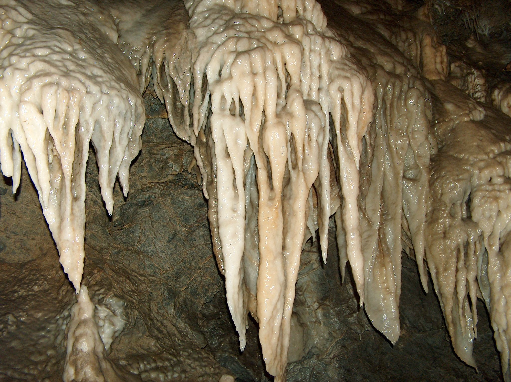 Calcareous stalactities - Stalattiti calcaree